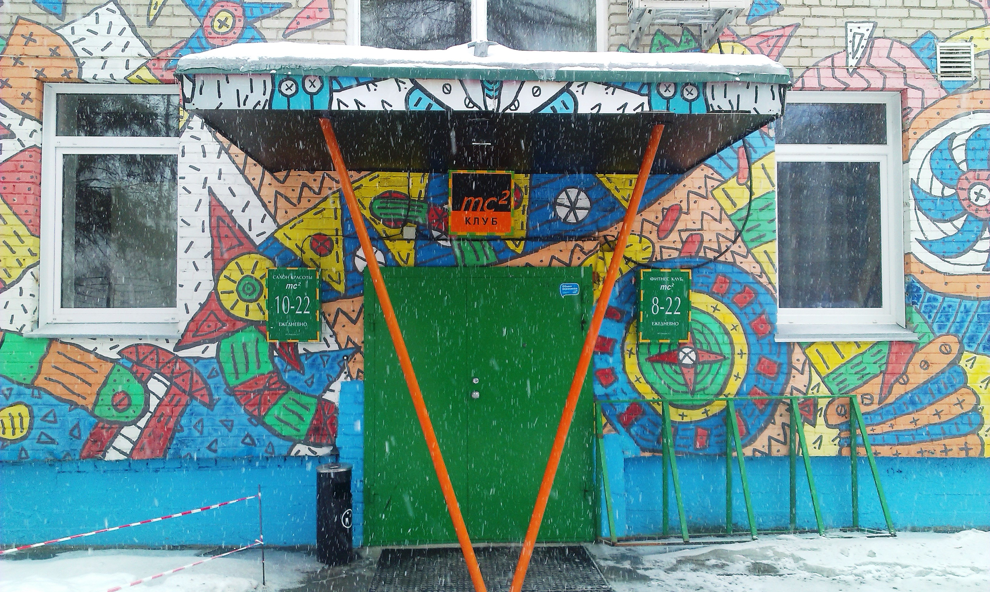 Новосибирский Академгородок